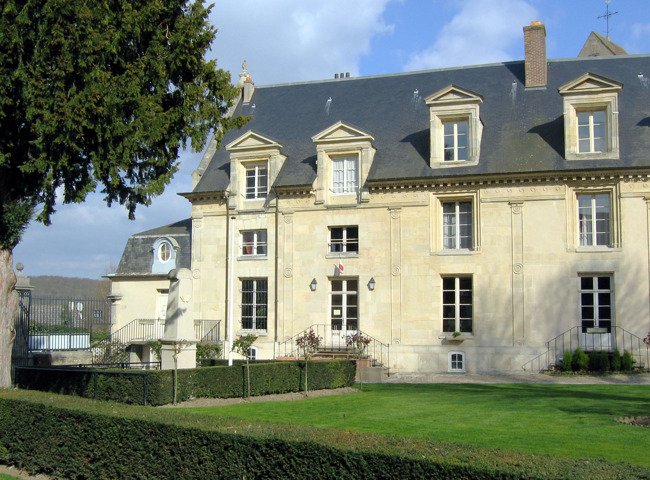 Mairie de la commune de Bazemont, ancien château seigneurial (78 - Yvelines)